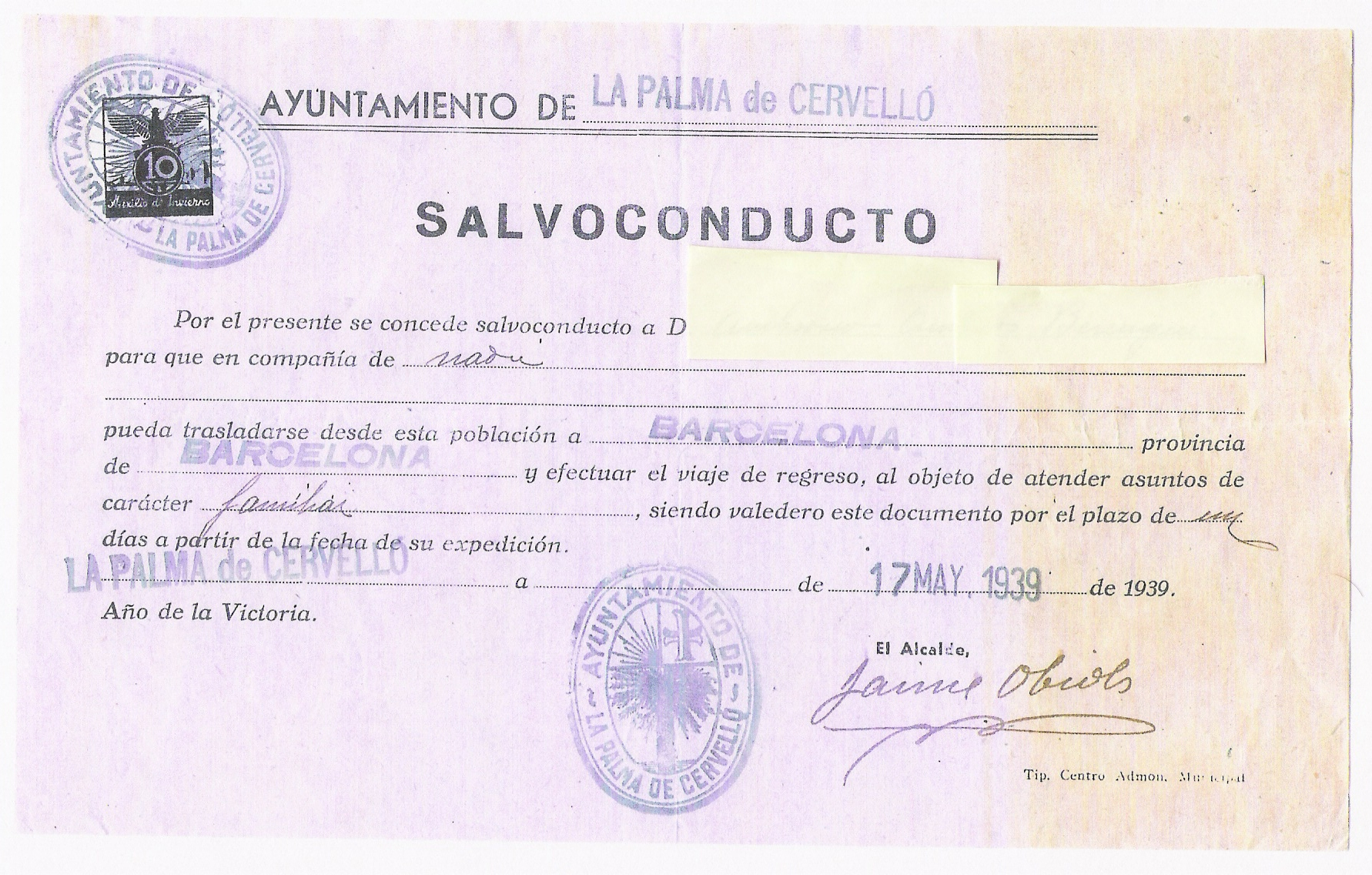 Salconduit o passi per a sortir de La Palma de cervelló el mes de maig de 1939